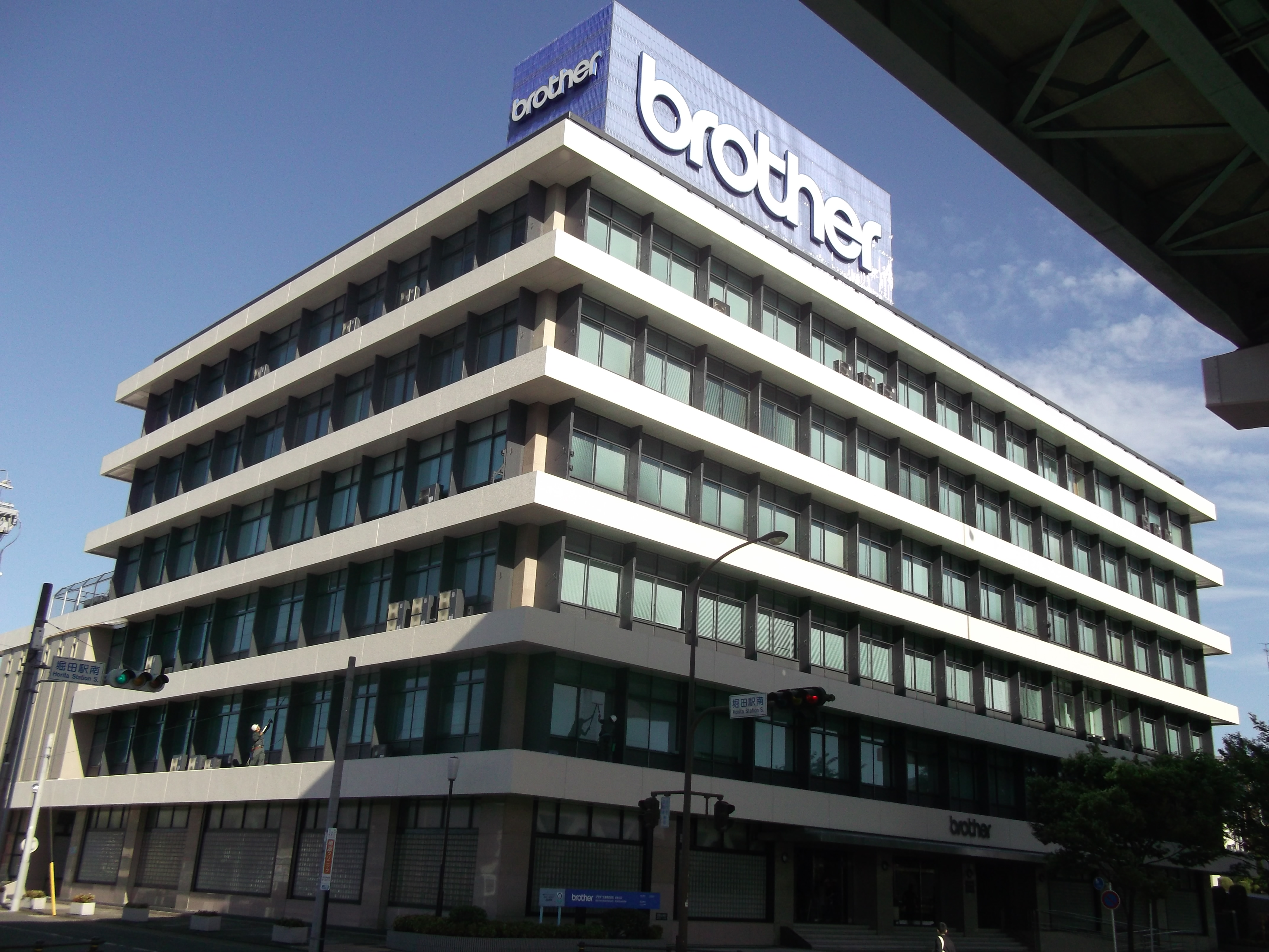 名古屋市瑞穂区のブラザー工業本社ビル西側公道北側より写す